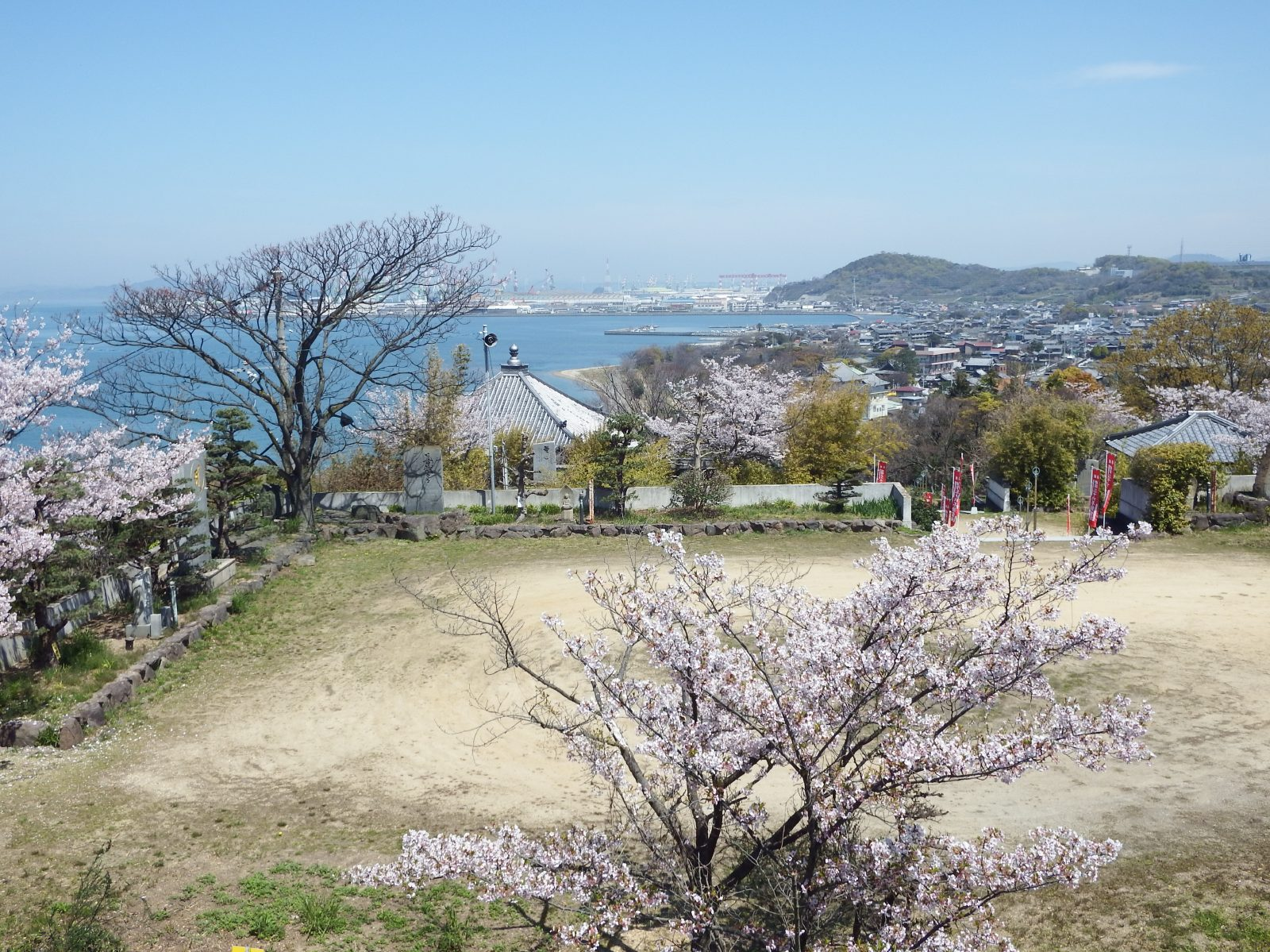 海岸寺の全景